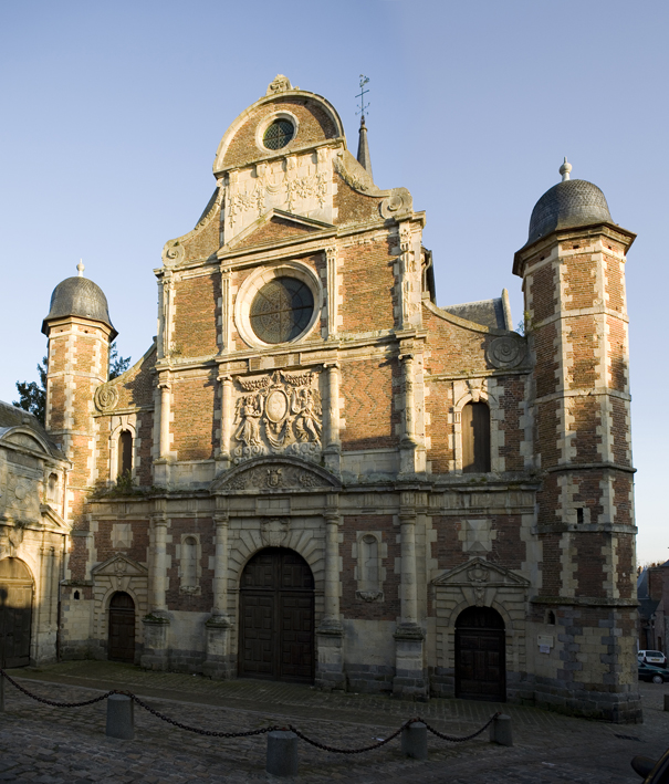 Chapelle du Collège d'Eu, Seine-Maritime